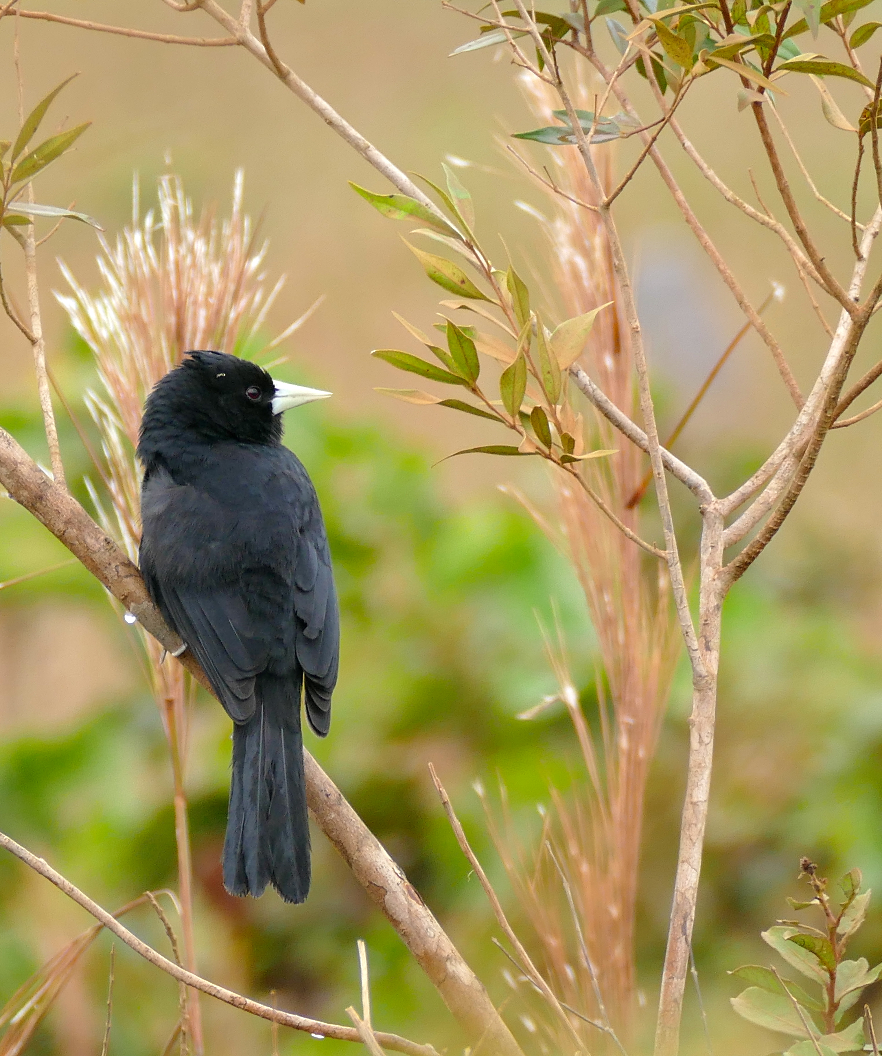 Transpantaneira, Poconé, Mato Grosso, BRAZIL